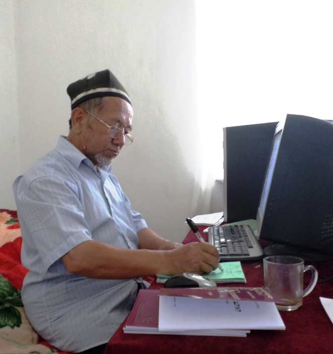 Тоҷикӣ: Шариф Нуриддин, журналист ва нависандаи ӯзбекзабон, Исфисор, ш. Ғафуров